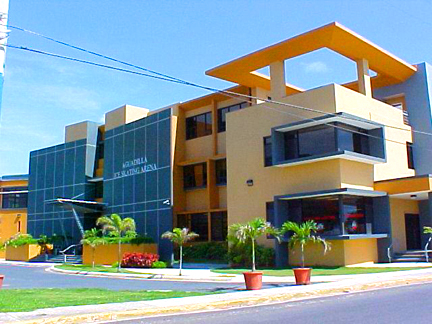 Ice Skating Arena in Aguadilla in Puerto Rico